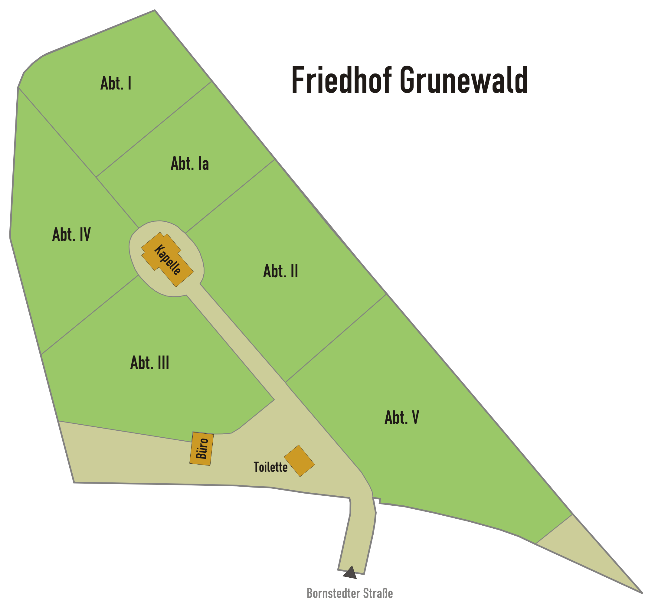 Plan der Abteilungen im Friedhof Grunewald in Berlin